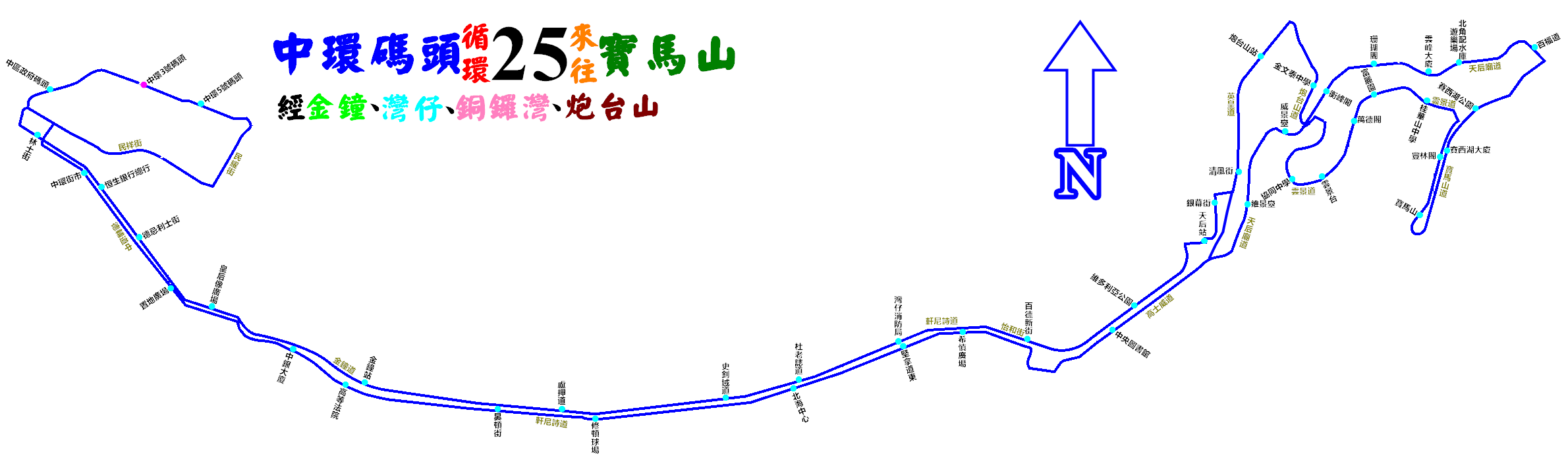 中文（香港）: 新巴25線的走線圖